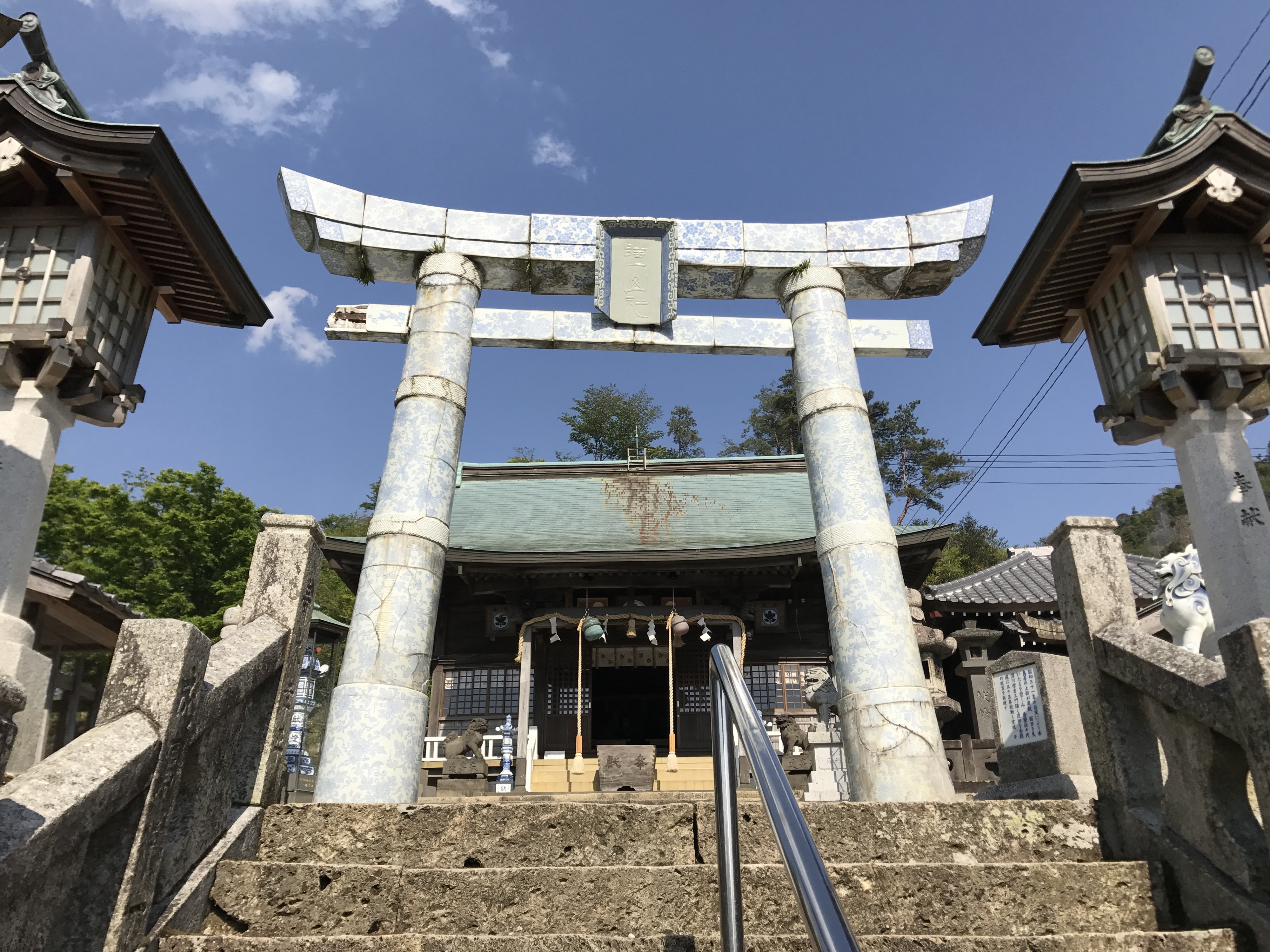 陶山神社の磁器製の鳥居